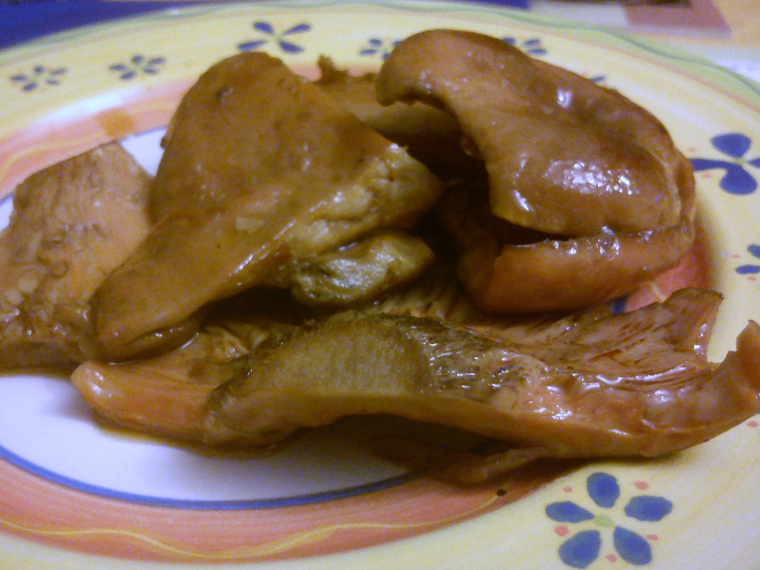 Rydze smażone (Poznań).